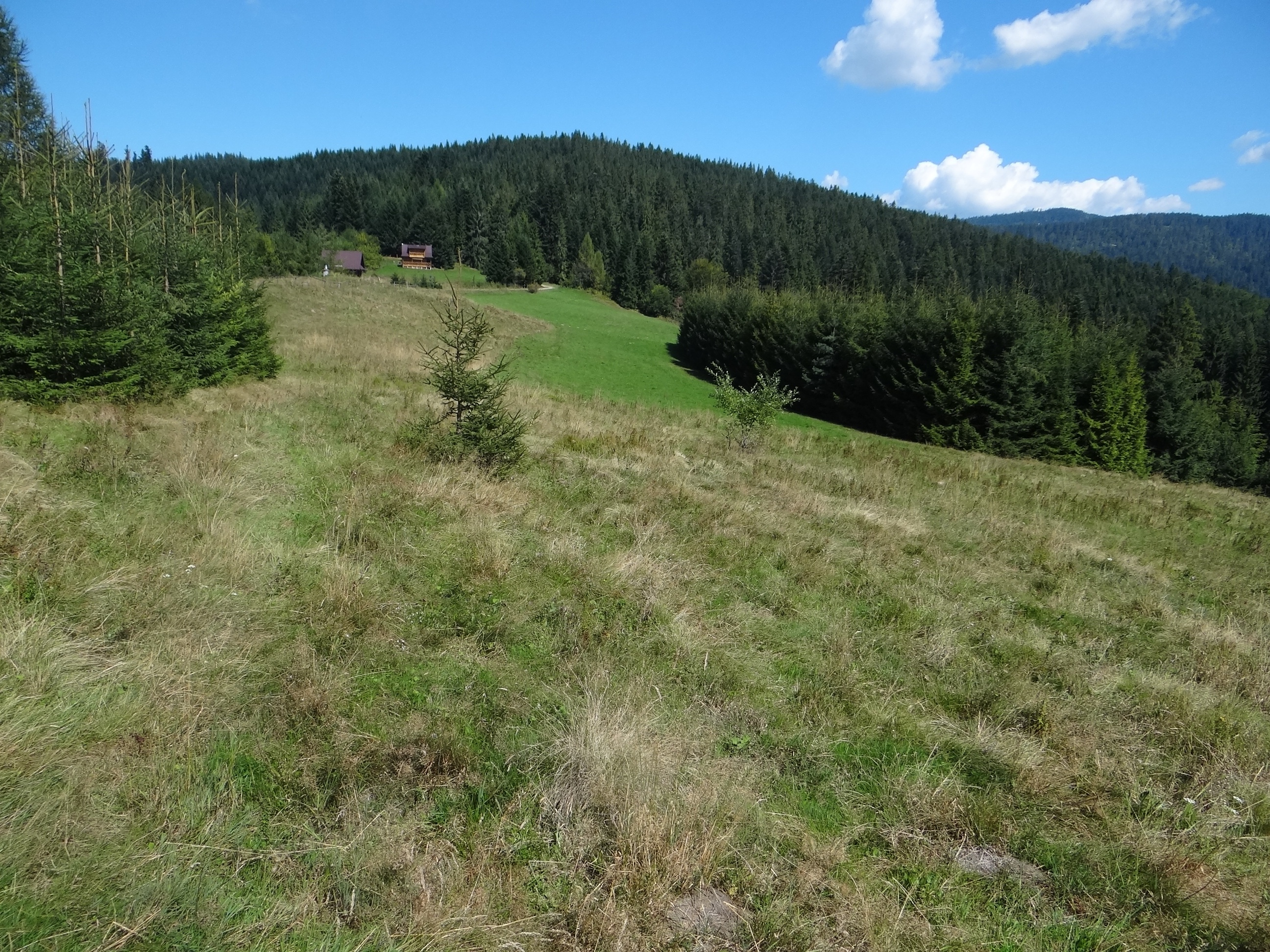 Polana Dziubasówki na grzbiecie Bukowiny Miejskiej w Gorcach